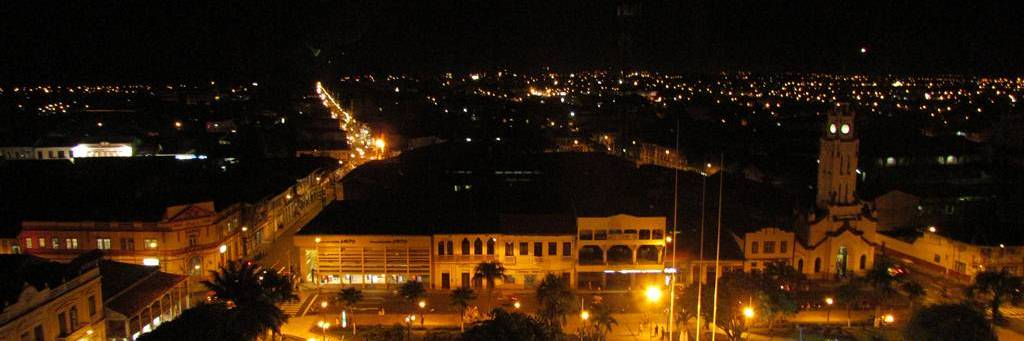 Vista amplia de Iquitos en la noche.